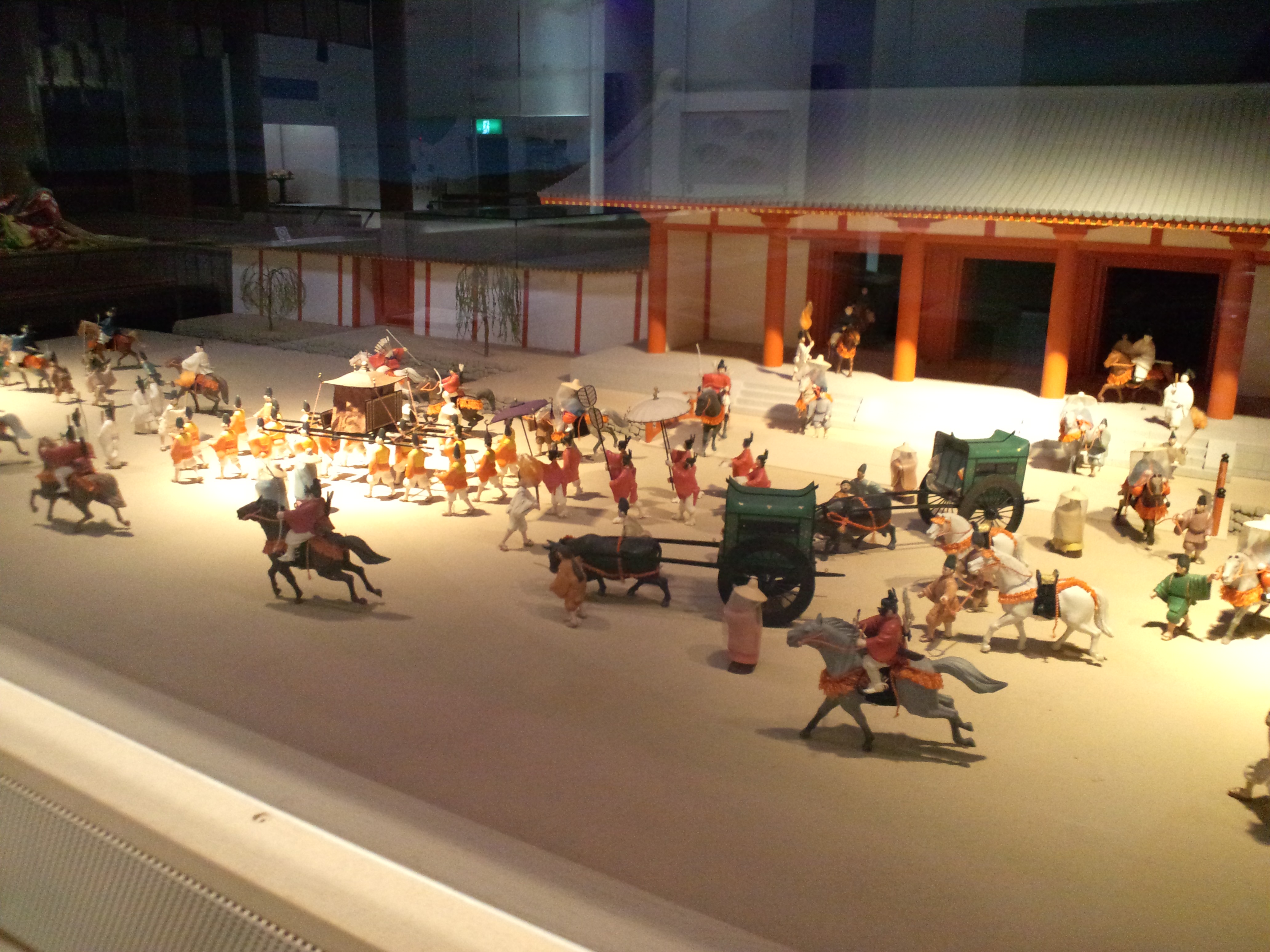 斎宮歴史博物館 展示物 都を出る斎王